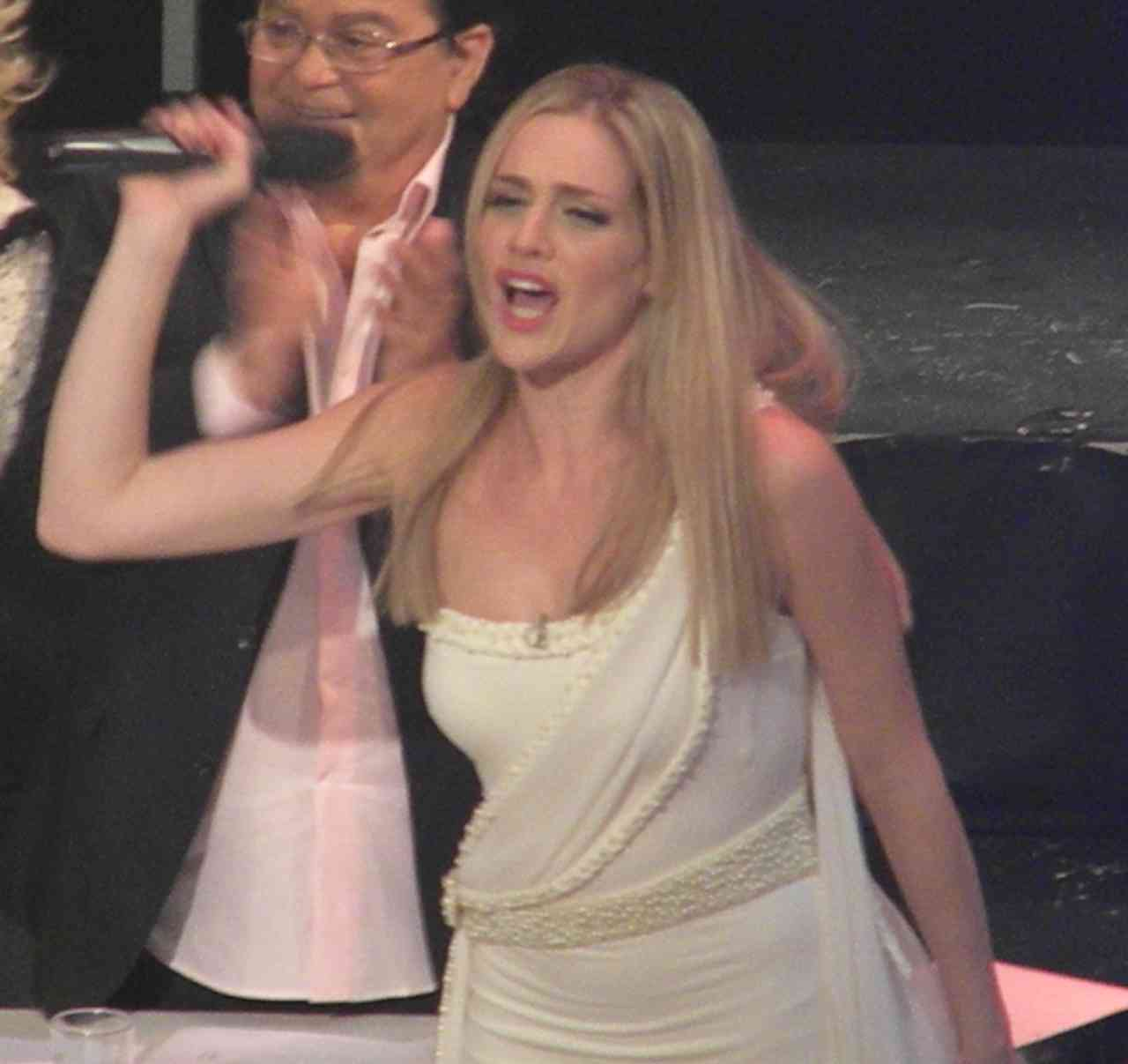 הילה נחשון על הסט של רוקדים עם כוכבים